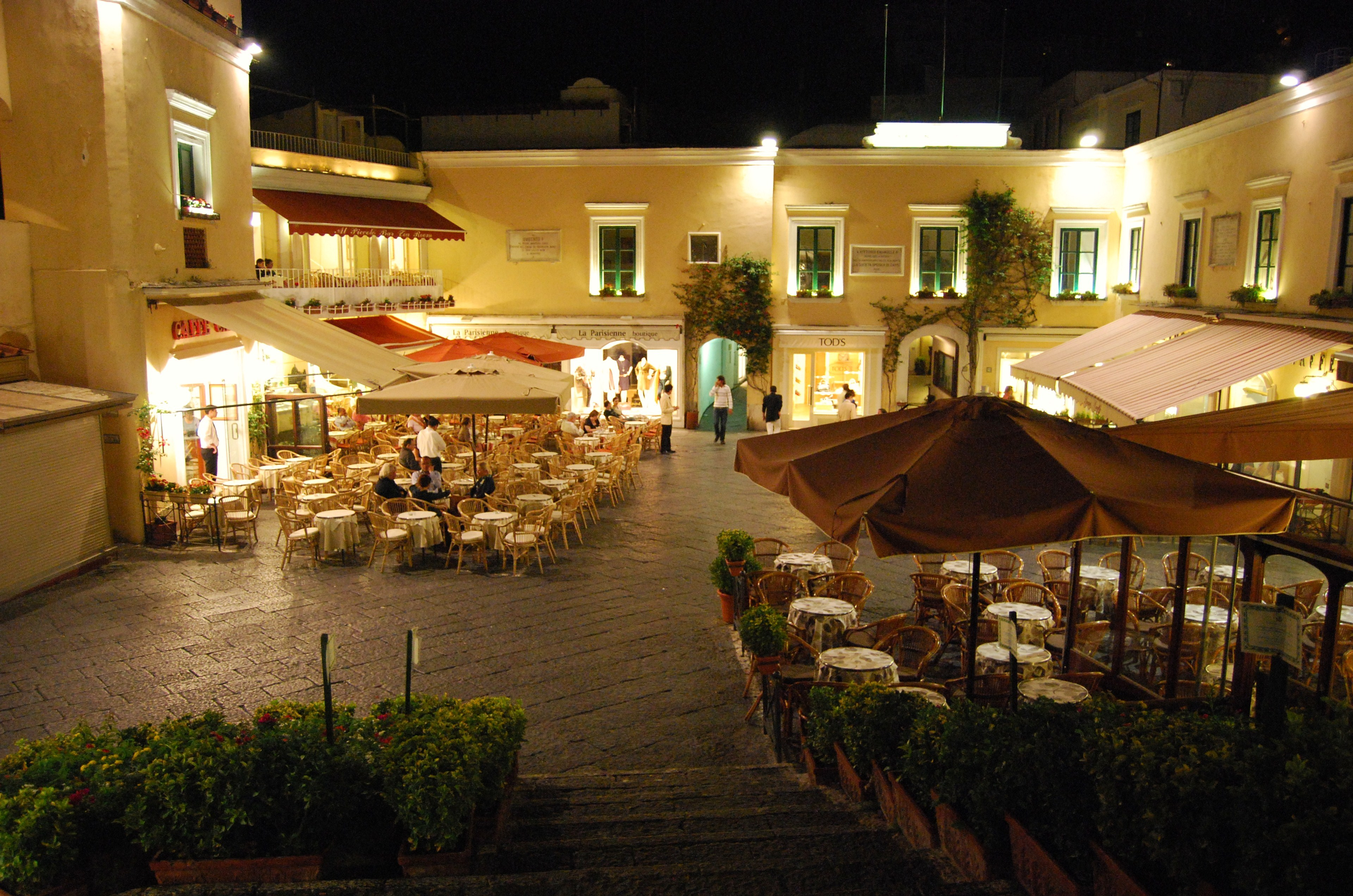 La piazzetta di Capri in versione notturna